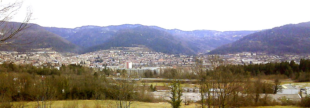 Vue d'Oyonnax depuis Veyziat